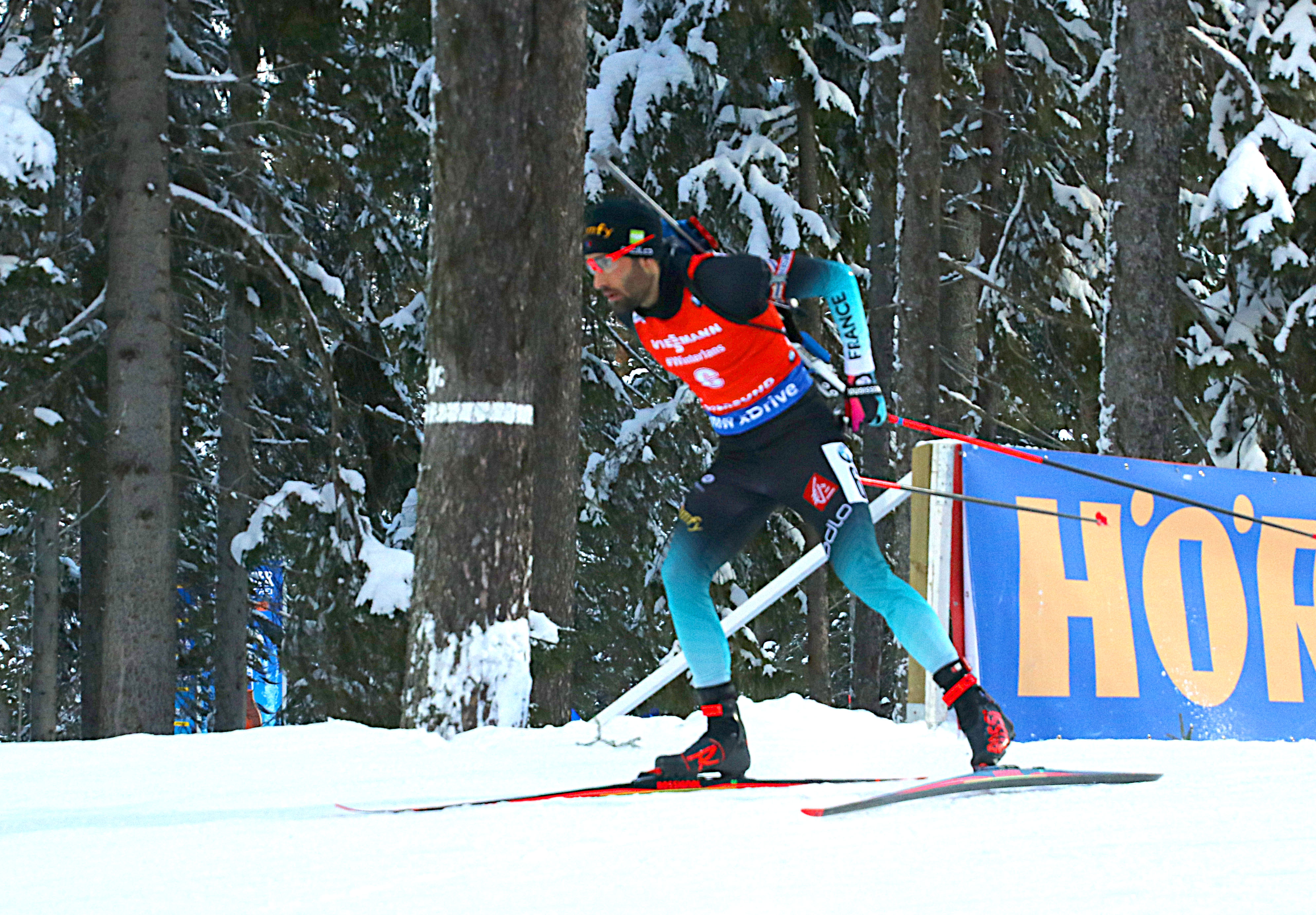 Östersund. Martin Fourcade på skidskytte-VM.